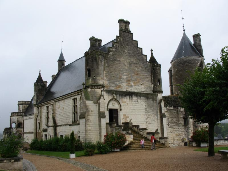 Chateau de Loches